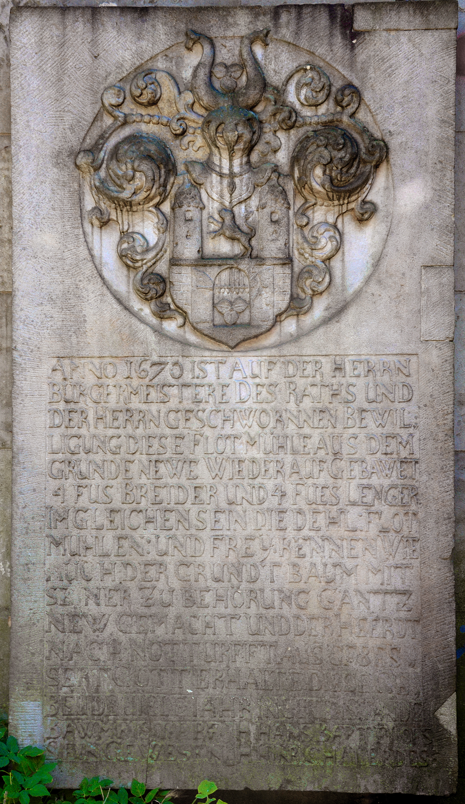 Am Beginn der Fußgänger-Unterführung vom Ufer der Leine unter den Friederikenplatz in Hannover findet sich neben zwei Bauinschriften-Steinen der Klickmühle auch der hier abgebildete Inschriftenstein der - 1950 abgerissenen - Brückmühle. Unter dem Helmbekrönten Wappen der Stadt findet sich der folgende Text: „Anno 1670 ist auf der Herren Bürgermeistere des Raths und der Herren Geschwornnen Bewilligung diese Flotmühle aus dem Grunde neu wieder aufgebawet 4 Fus breider und 4 Fues lenger. Im gleichen sein die Dehl, Flotmühlen, und Freirennen wie auch der Grundtbaum mit seiner Zubehörung gantz new gemacht und der Heerdt nach Notdurfft ausgebessert. Gott erhalte diese Gebeude viele Jahre in guten Stande. Baumeistere sein gewesen J. H. Barteldes J. H. Hinrich Alerdes.“ ...